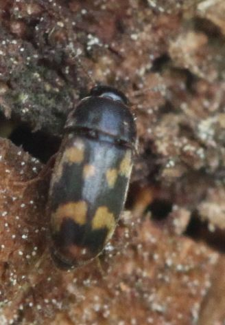 Litargus connexus am 3.6.2017 in der Schwetzinger Hardt